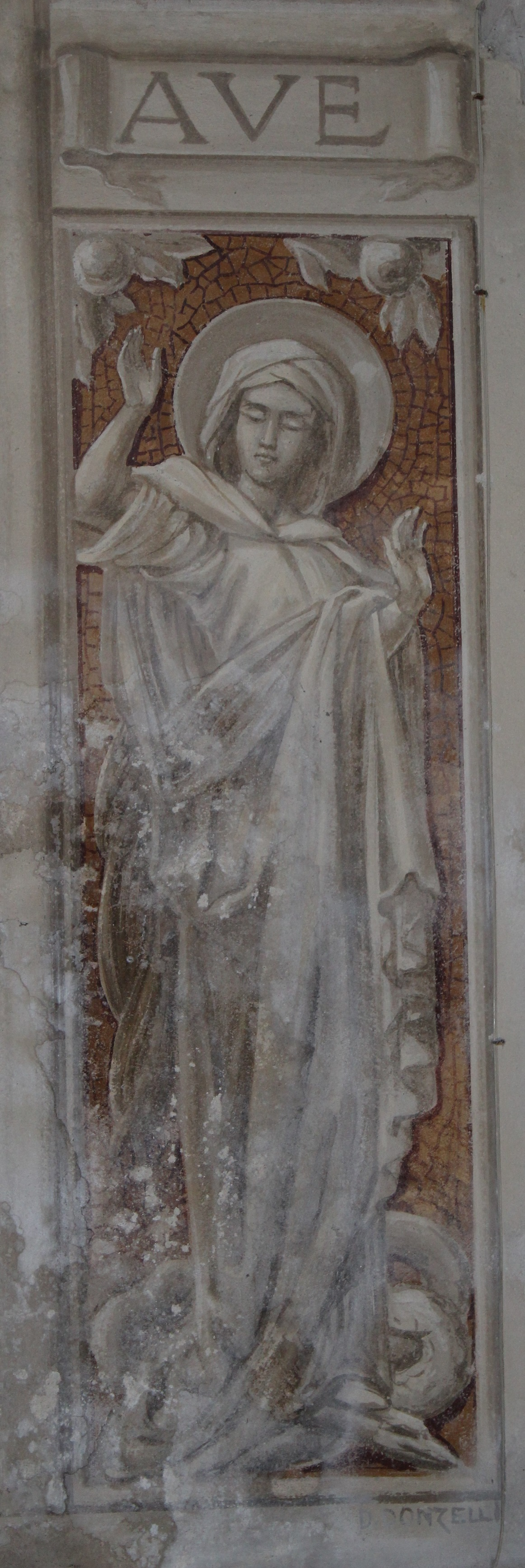 Marie, fresque, Duilio Donzelli, Creuë